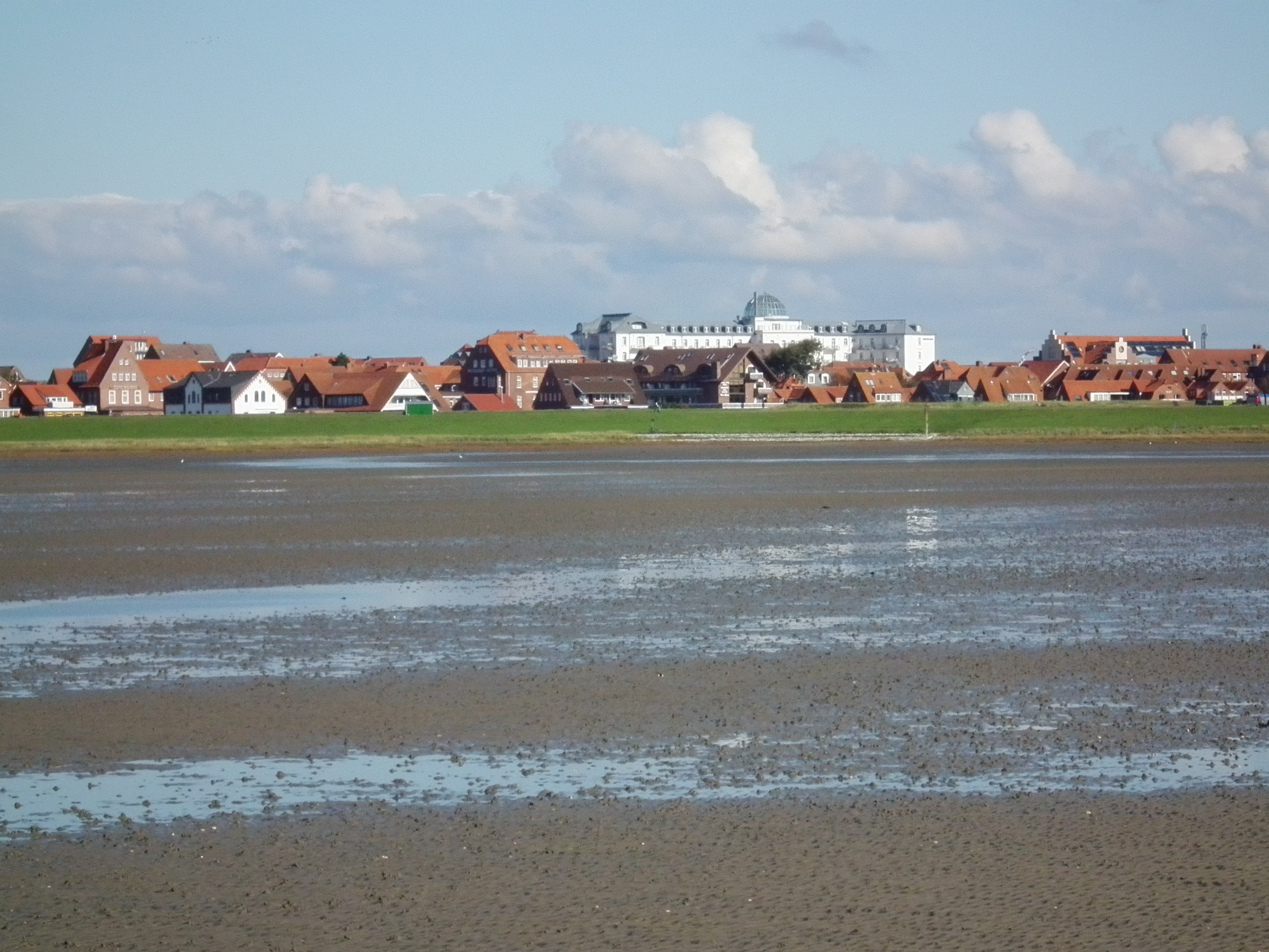 Blick von der Wattfläche auf den Hauptort der ostfriesischen Nordseeinsel Juist (Niedersachsen, Deutschland)